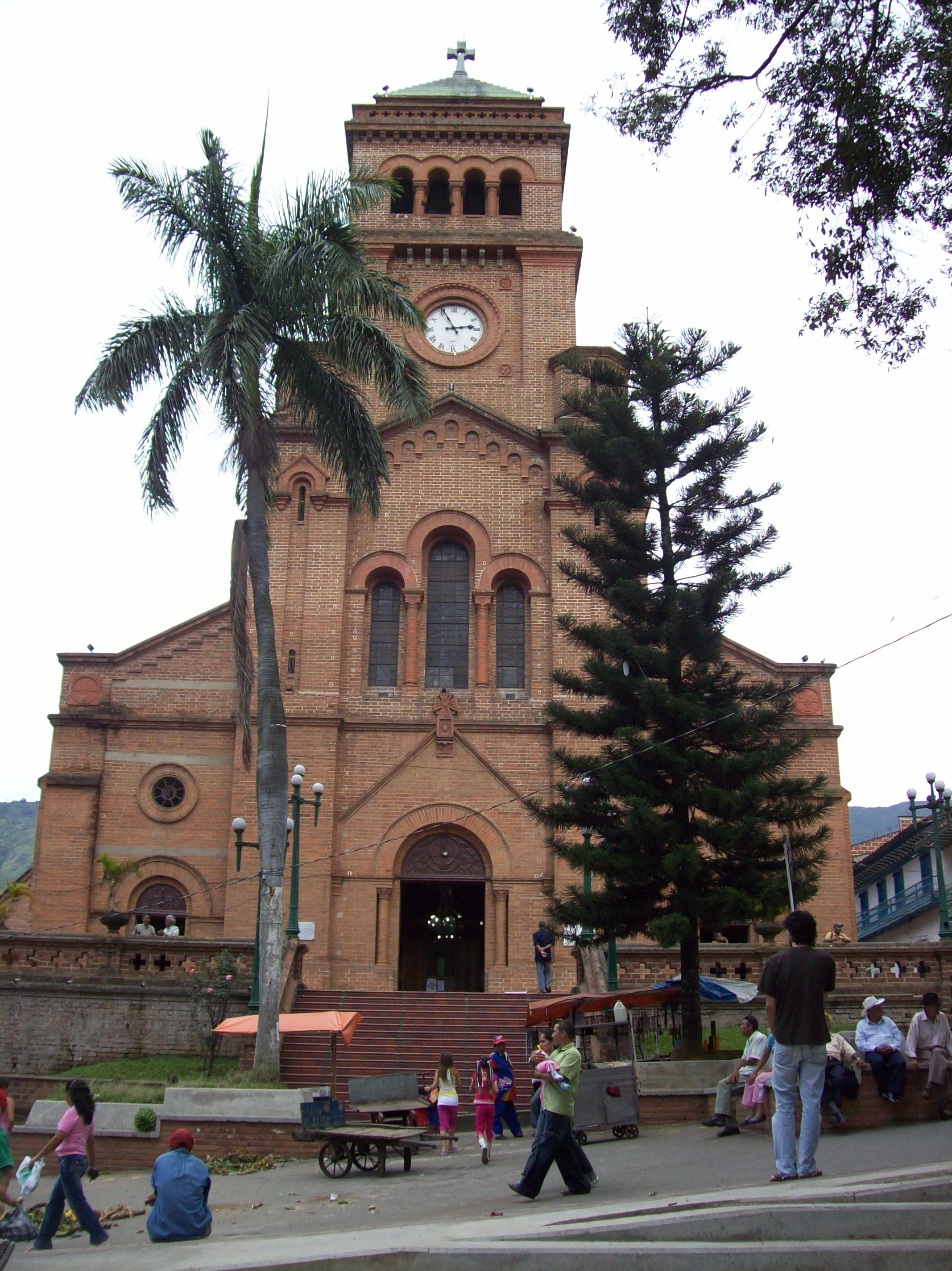 Frontis de la Catedral de Nuestra Señora del Rosario de Girardota en Girardota.